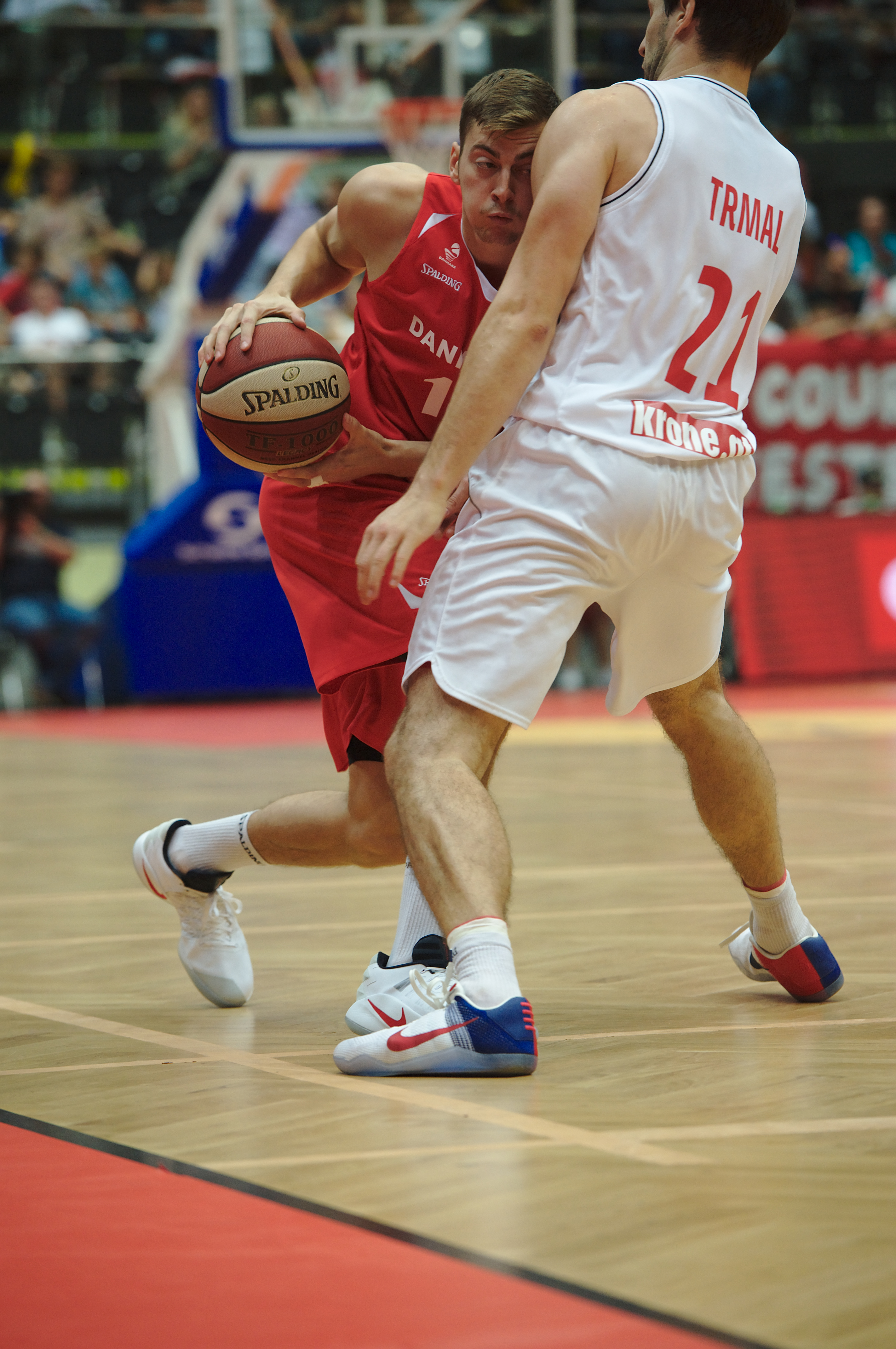 FIBA-Basketball EM-Qualifikation am 7.9.2016 im Multiversum in Schwechat, Österreich - Dänemark. Bild zeigt Zarko Jukić (DEN).